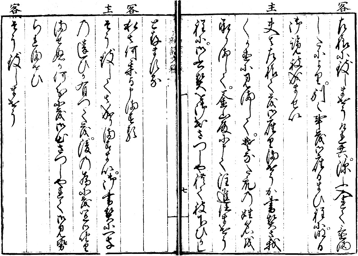 「No.67 捷解新語」のうち「捷解新語文釈」『国語史資料集——図録と解説——』国語学会（編）、武蔵野書院、1976年。安田章（解説）。をスキャン。